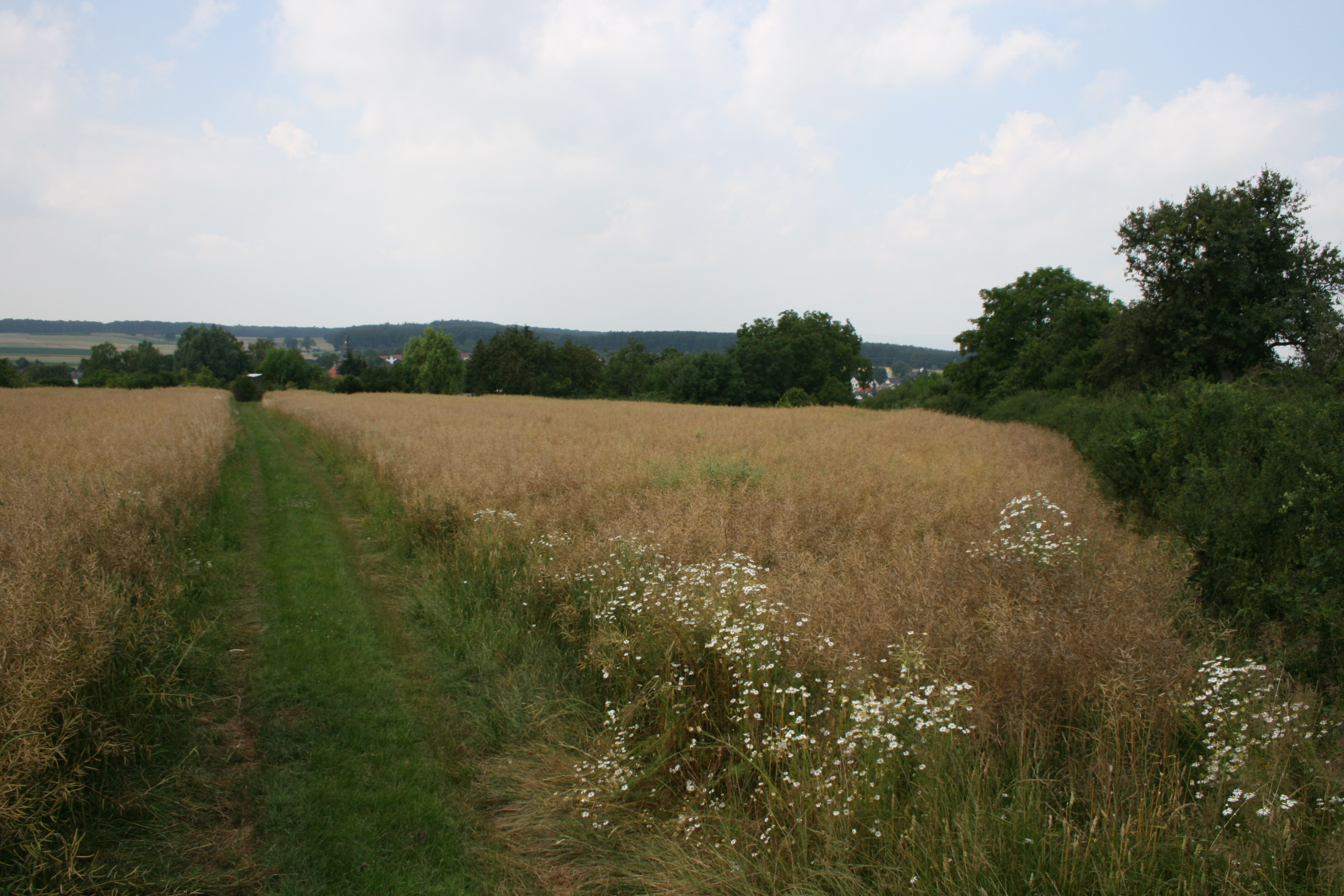 Kleinkastell Stammheim am Obergermanisch-Raetischen Limes. Blick von Westen über das ehemalige Kastellgelände.